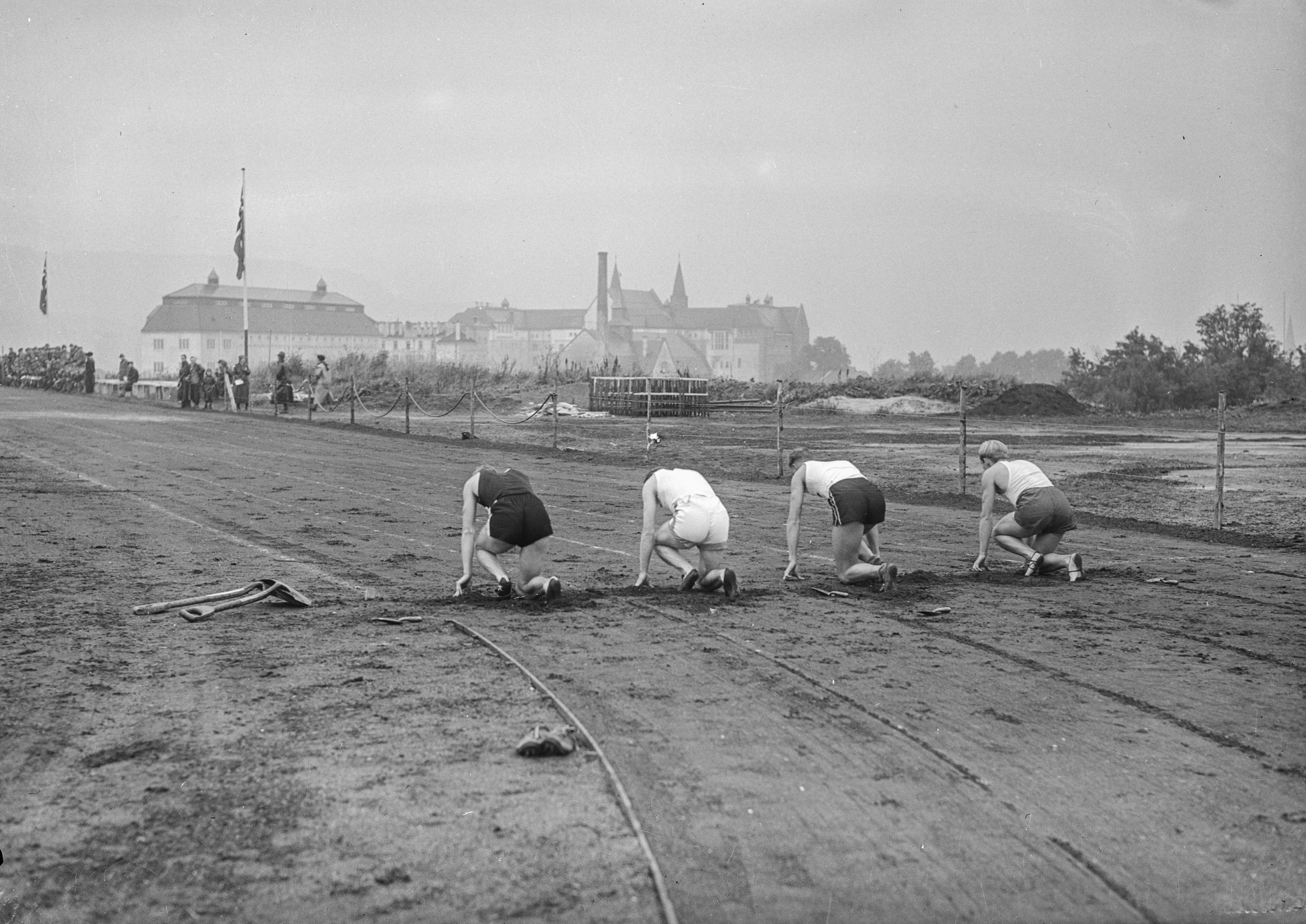 Idrettsplass for NTHi sør på Gløshaugen-platået. Plassen ble opparbeidet som kommunalt nødarbeid. Sto ferdig sommeren 1934. Sterkt ødelagt under krigen. Ikke opparbeidet på ny etter krigen. NTH skulle ha arealene til utbygging